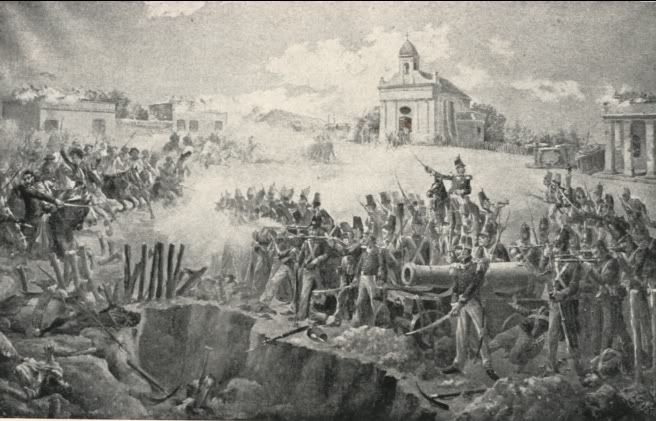 Obra del pintor uruguayo Diógenes Hecquet (1866-1902) “Combate de San José”.